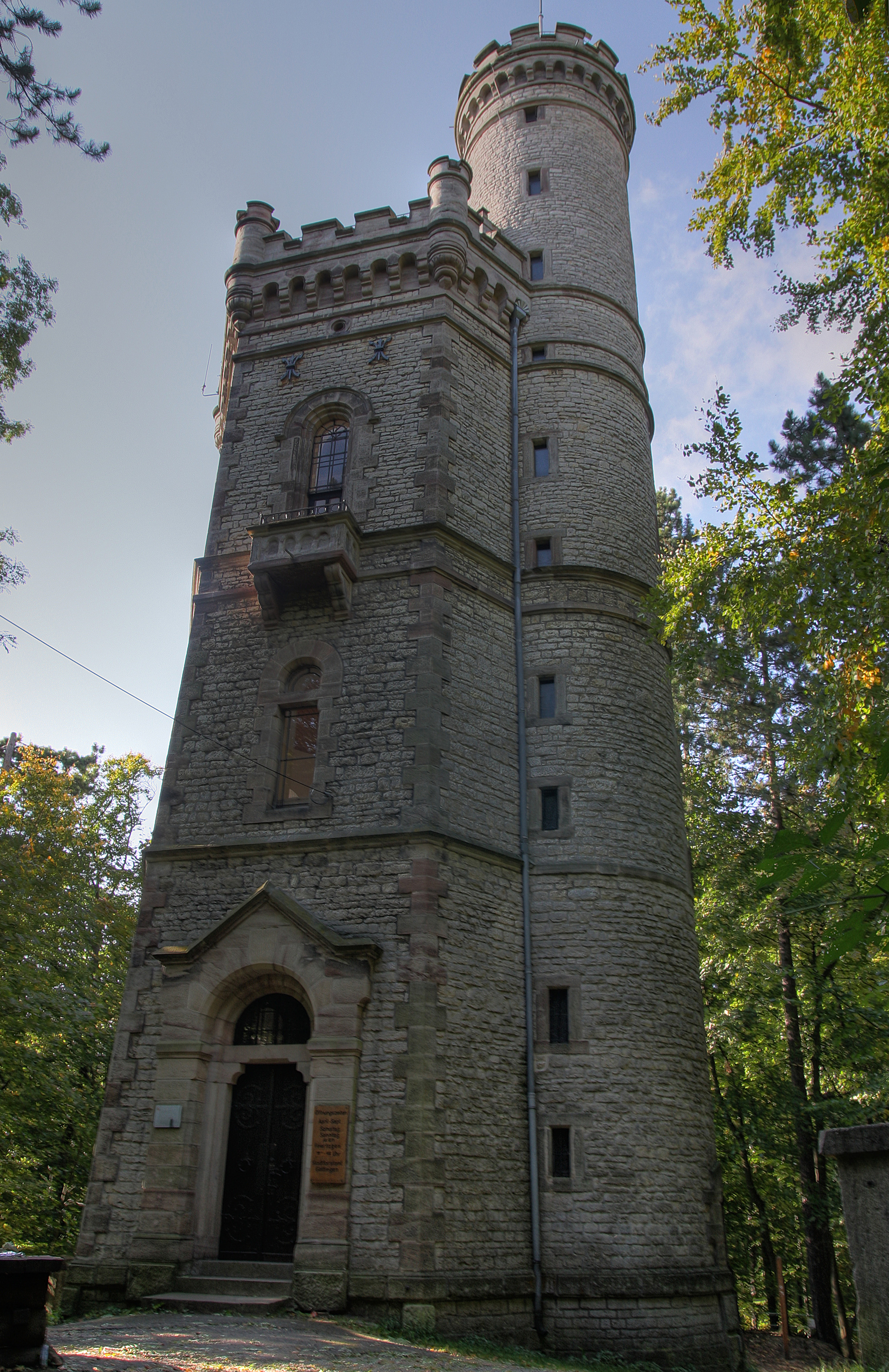 Bismarckturm Göttingen